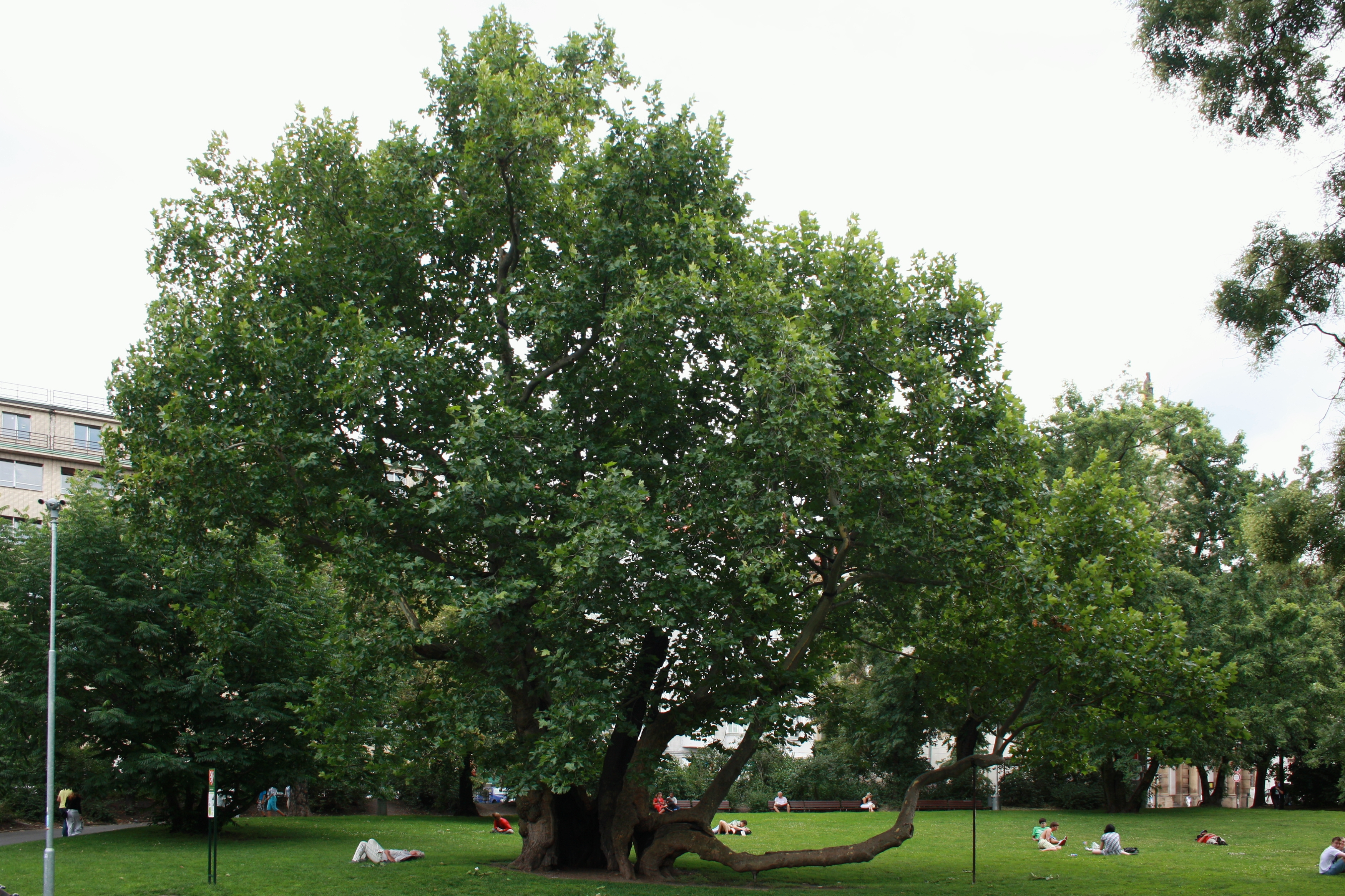 Praha, Nové Město - památný platan na Karlově náměstí